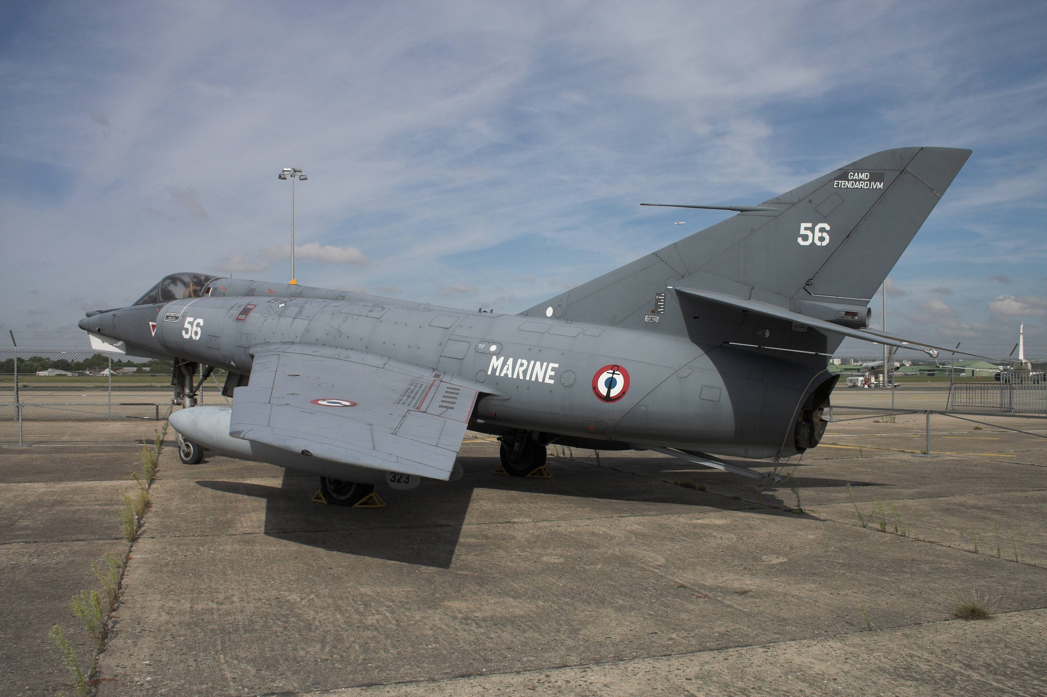 Dassault Etendard in the Museum of Air and Space (Musée de l'air et de l'espace, Le Bourget, France)